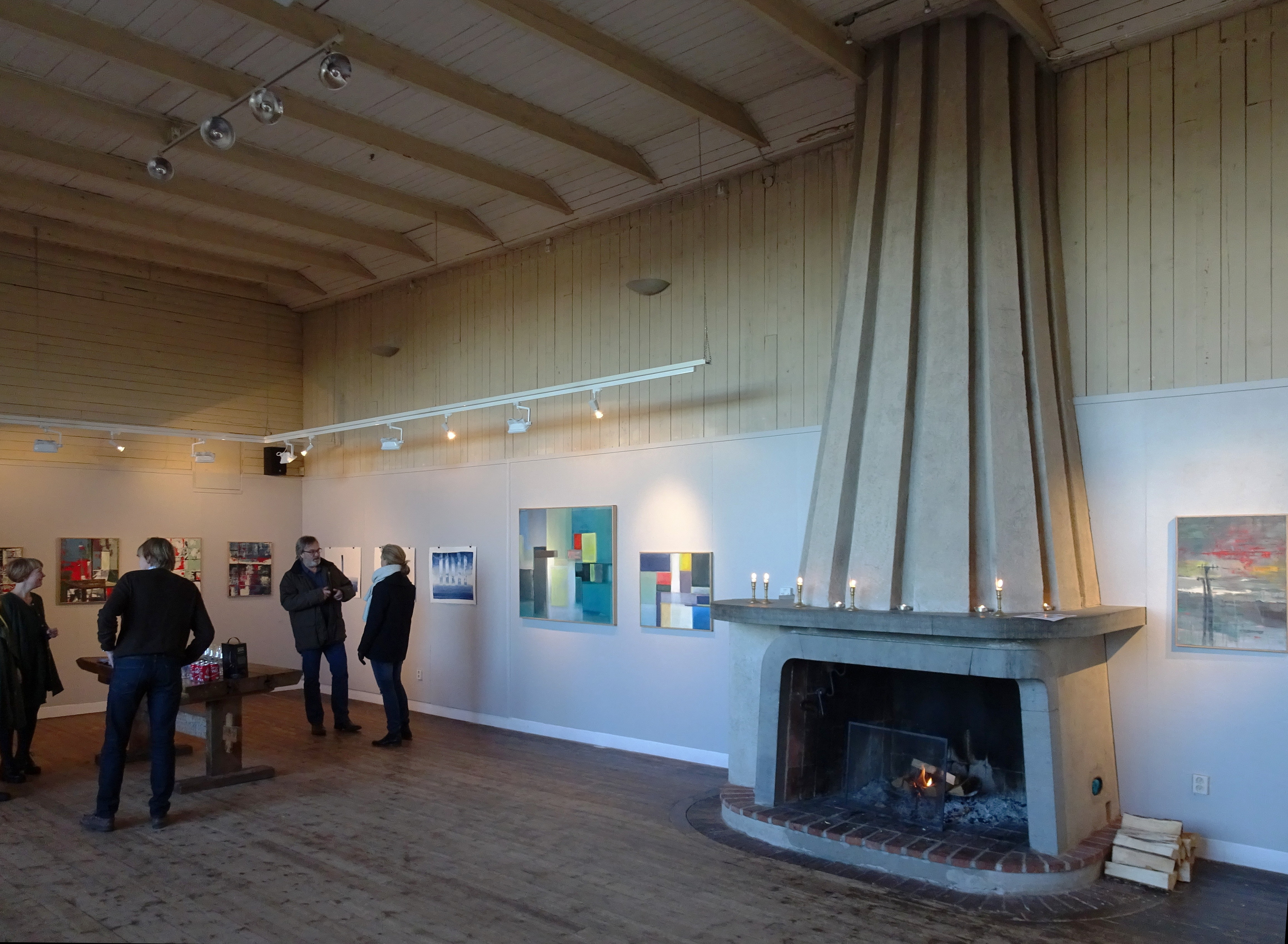 Grünewaldvillan, interiör, ataljén